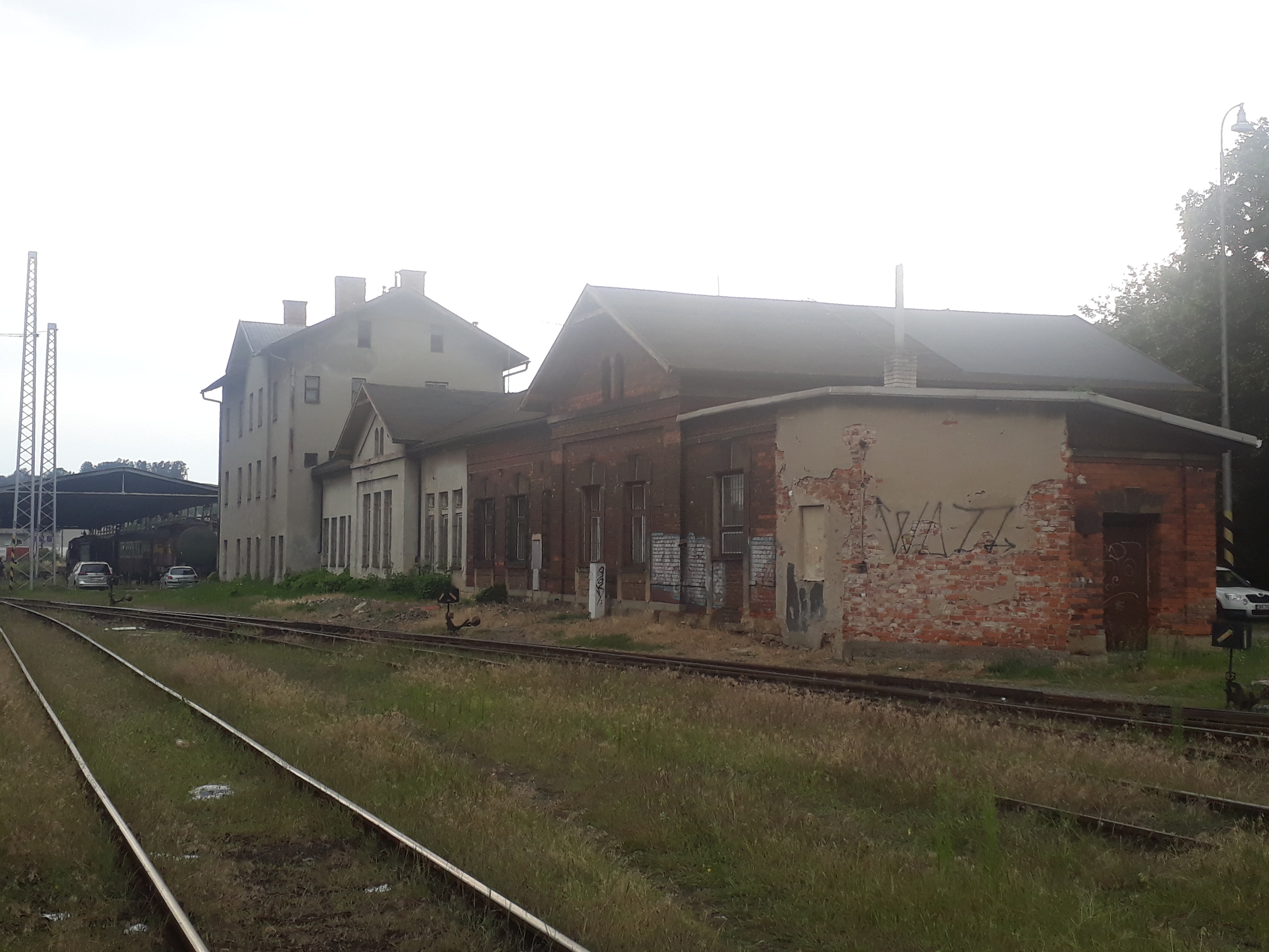 Býv. výpravní budovy ve Valašském Meziříčí